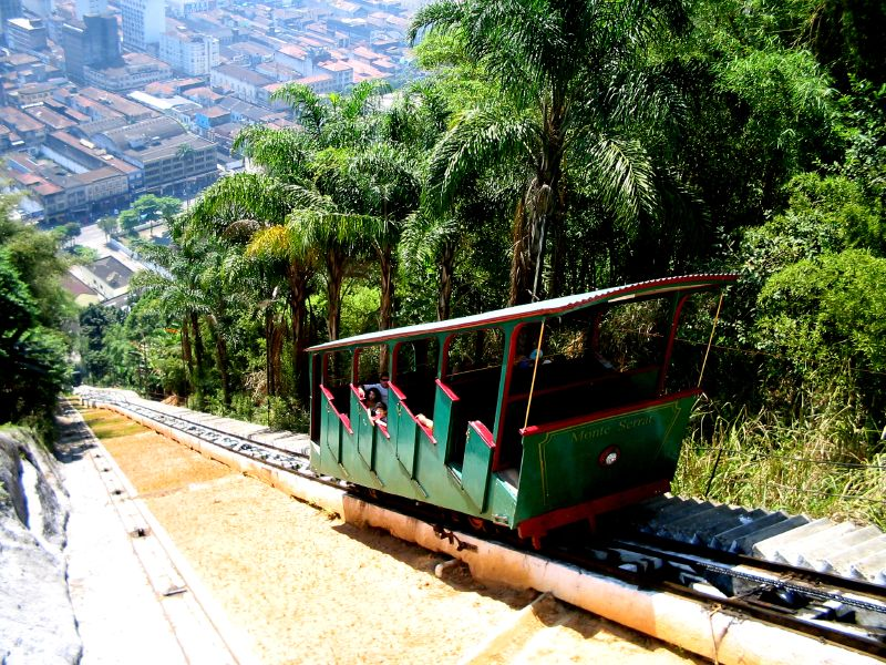 Sistema Funicular do Monte Serrat - Santos - SP - Brasil.